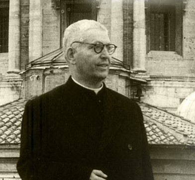 Padre Brás numa das suas viagens a Roma